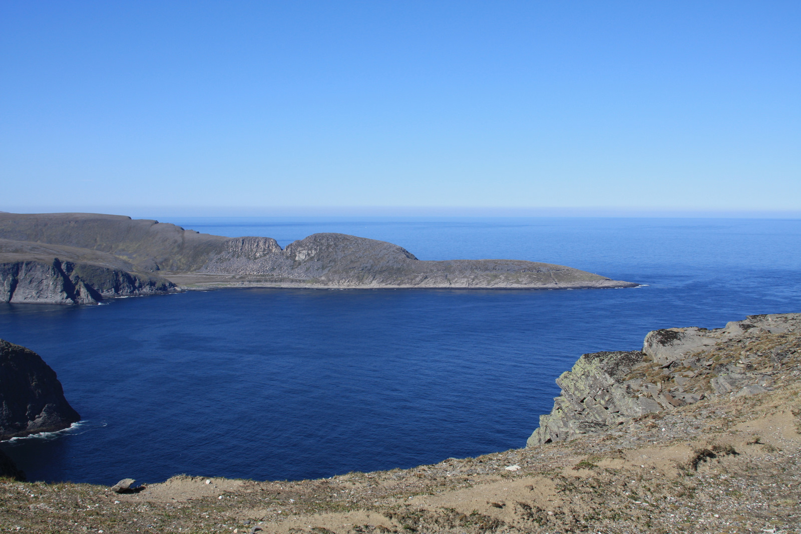 Knivskjelodden from Nordkapp